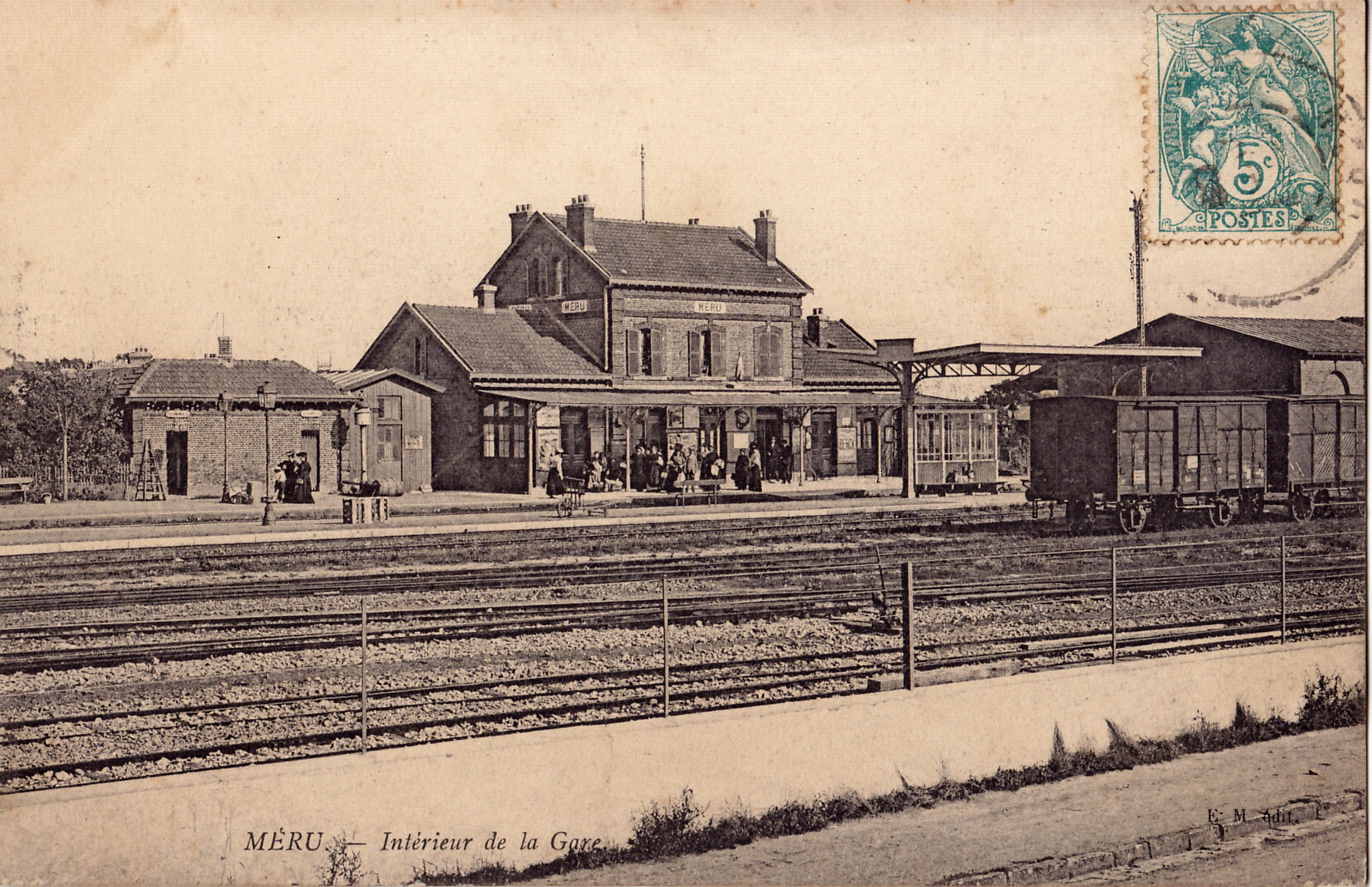 Carte postale ancienne éditée par EM : MERU - Intérieur de la Gare